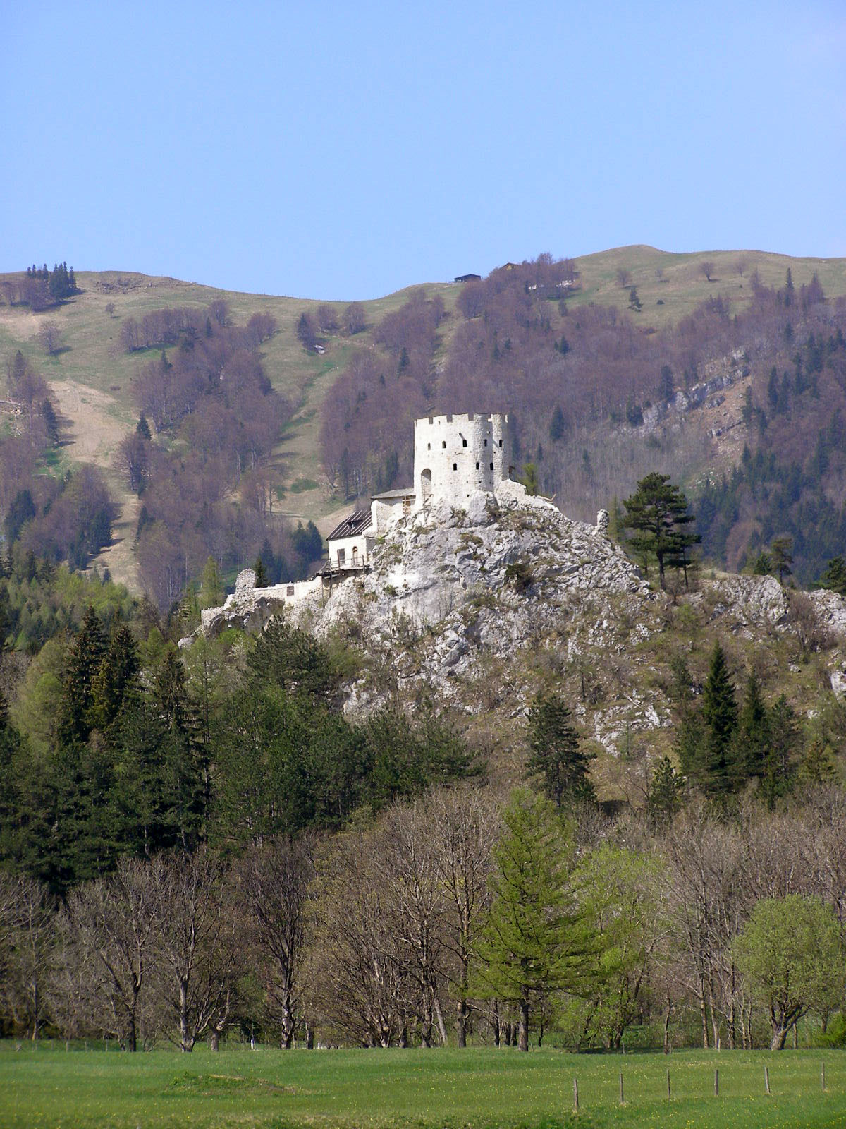 Restaurierte Burgruine Losenheim